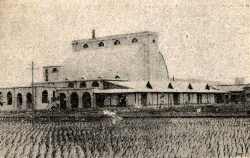 中文（台灣）: 彰化農業倉庫